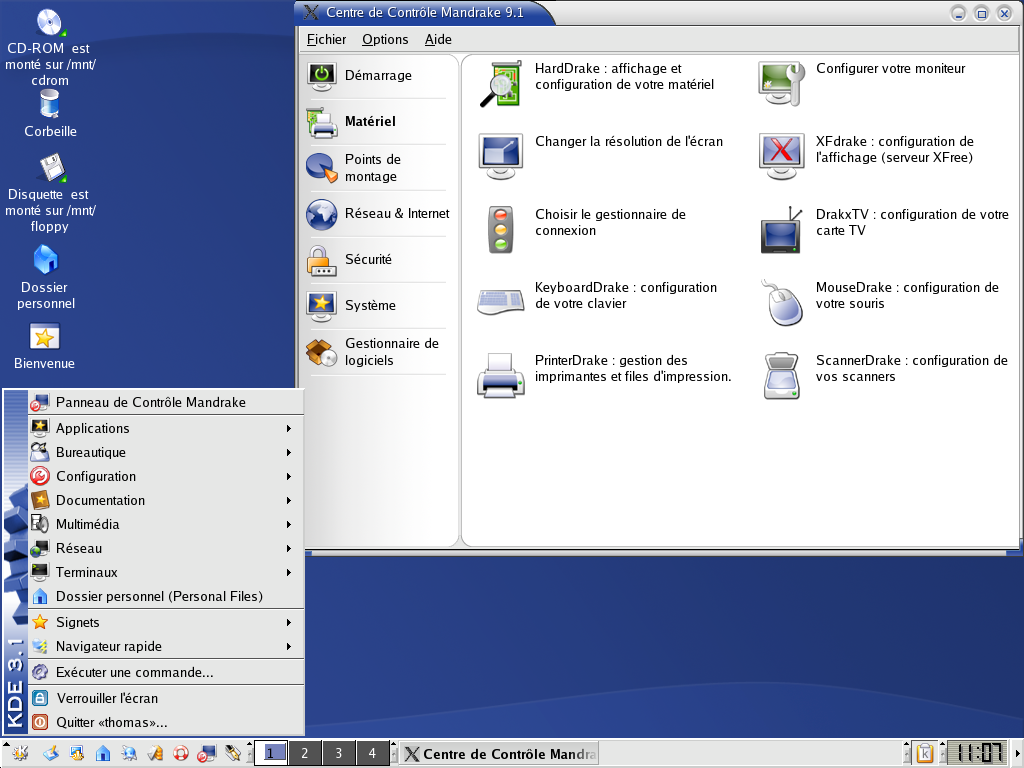 Image de Mandrake 9.1 Bamboo